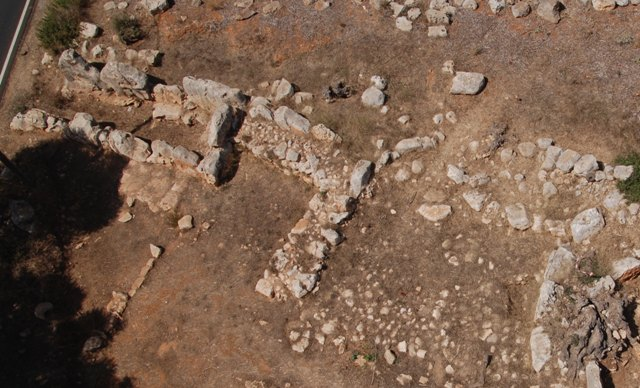 Estructures IIA, IIB i IIC Closos de can Gaià, Portocolom - Mallorca